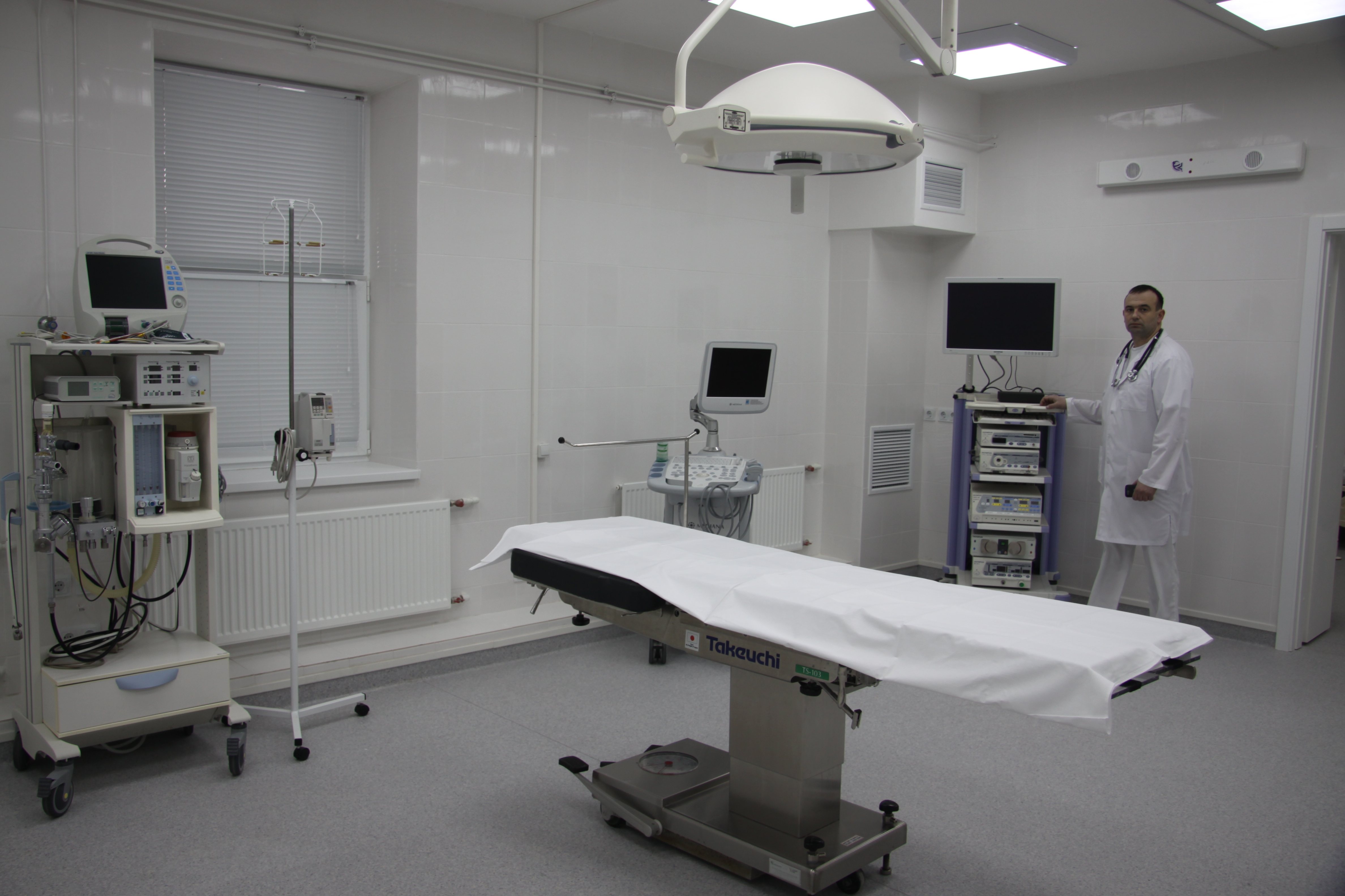 Лаборатория